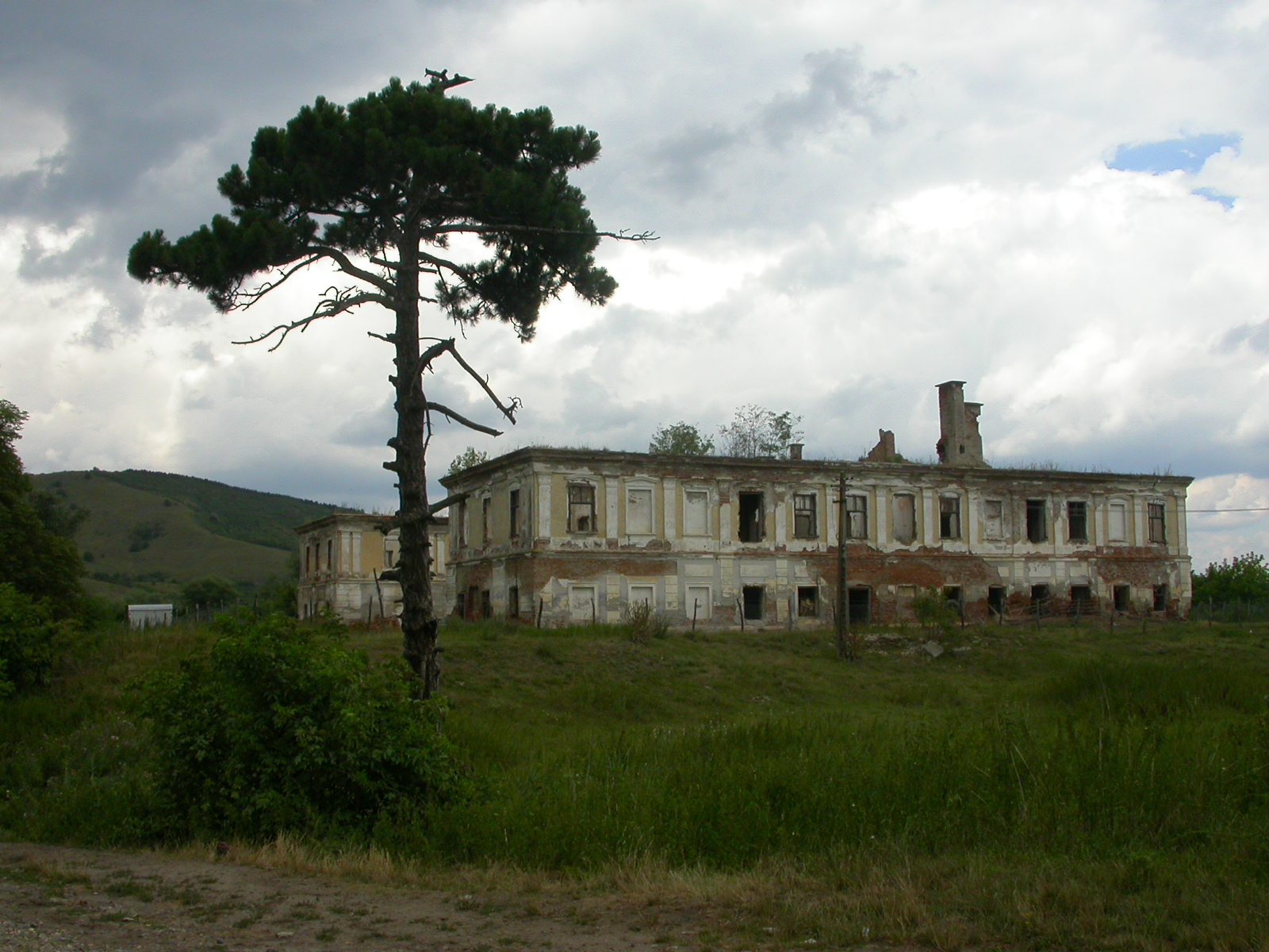 Castelul Haller, sec. XVII - XVIII 01